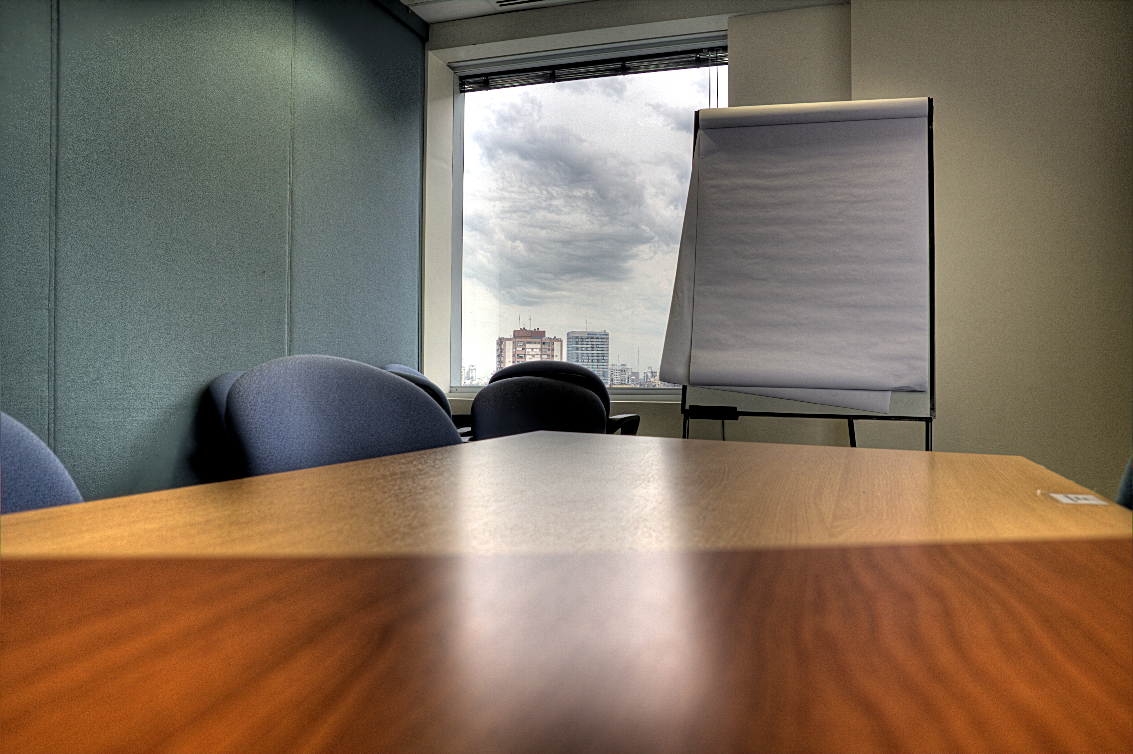 Meeting room